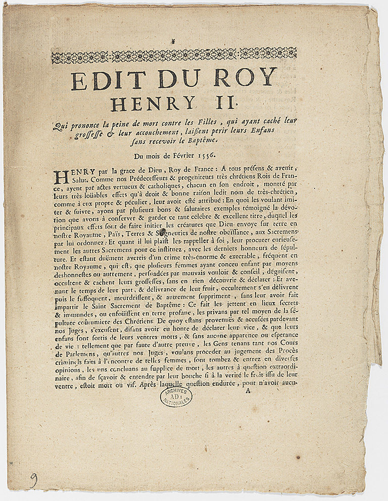 Édit du roi Henri II disposant que les femmes ayant dissimulé leur grossesse ou laissé mourir leurs enfants nouveaux-nés seront passibles de la peine de mort, février 1556